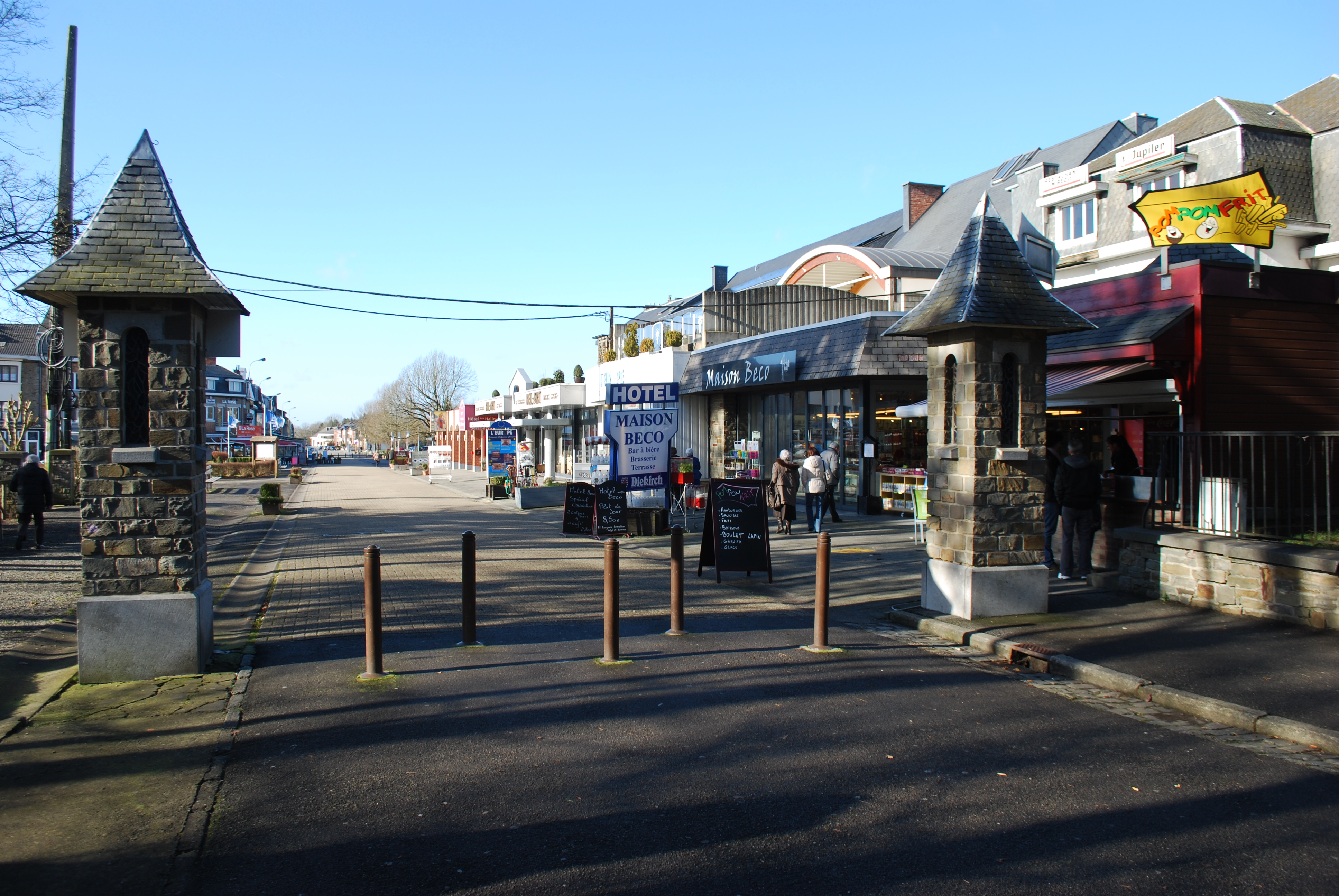 Vue du sanctuaire Notre-Dame de Banneux, près de Sprimont.